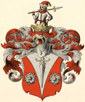 Weissmanni suguvõsa aadlivapp